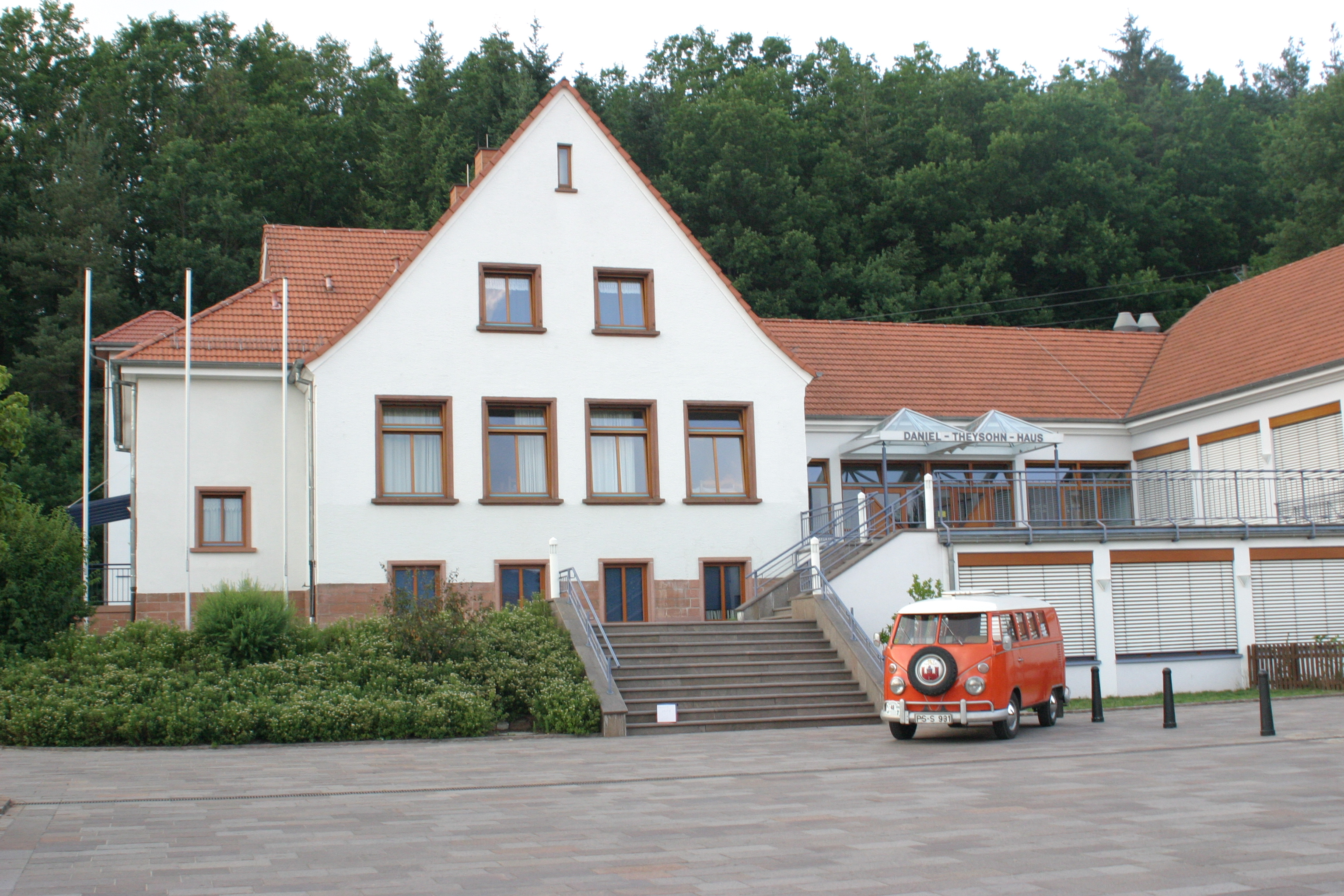 Ludwigswinkel